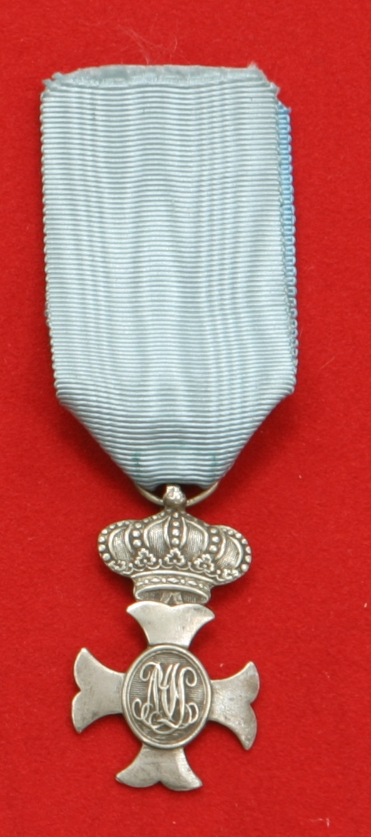 Médaille d'argent d'Isabelle II (médaille espagnole)